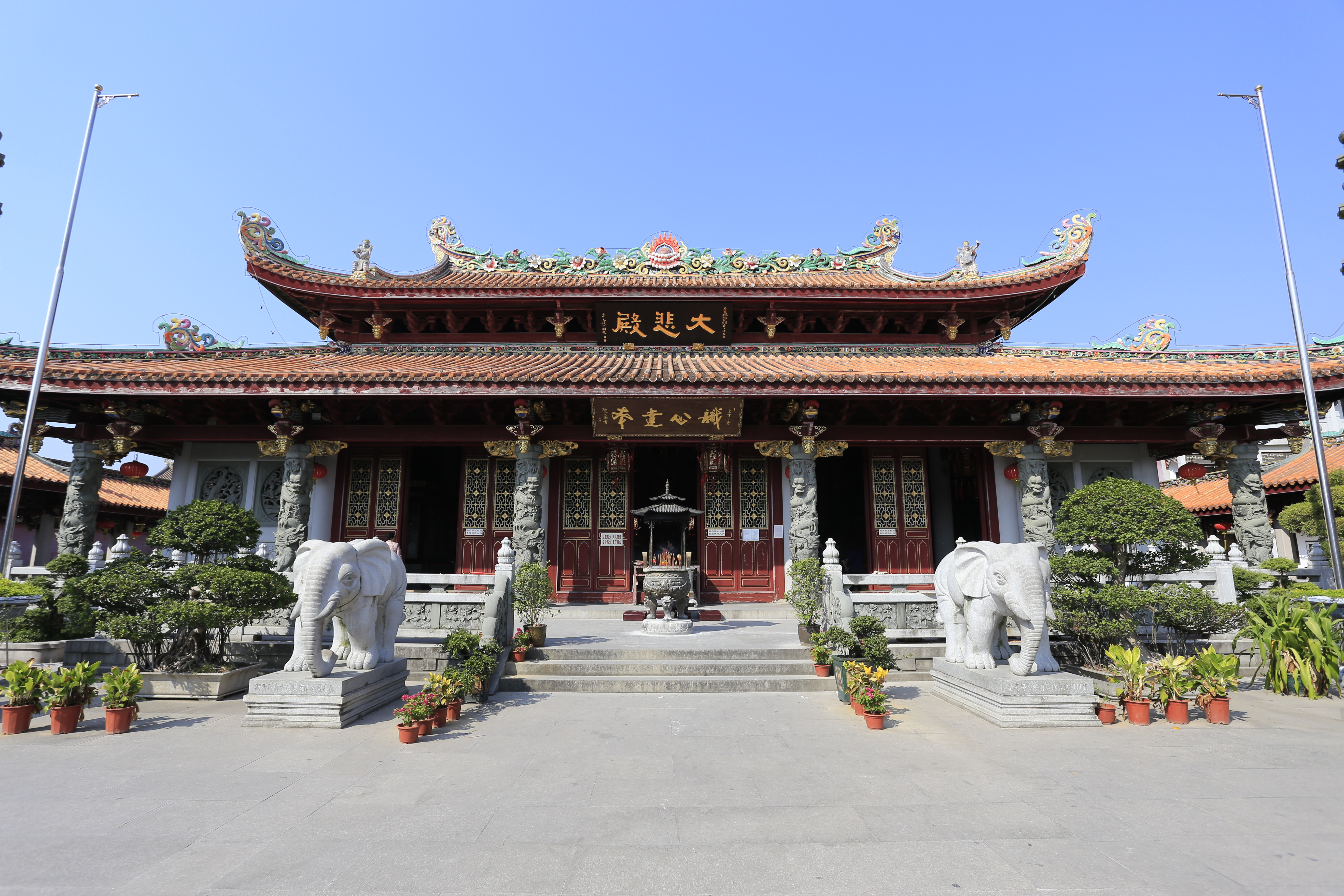 潮州开元寺 大悲殿